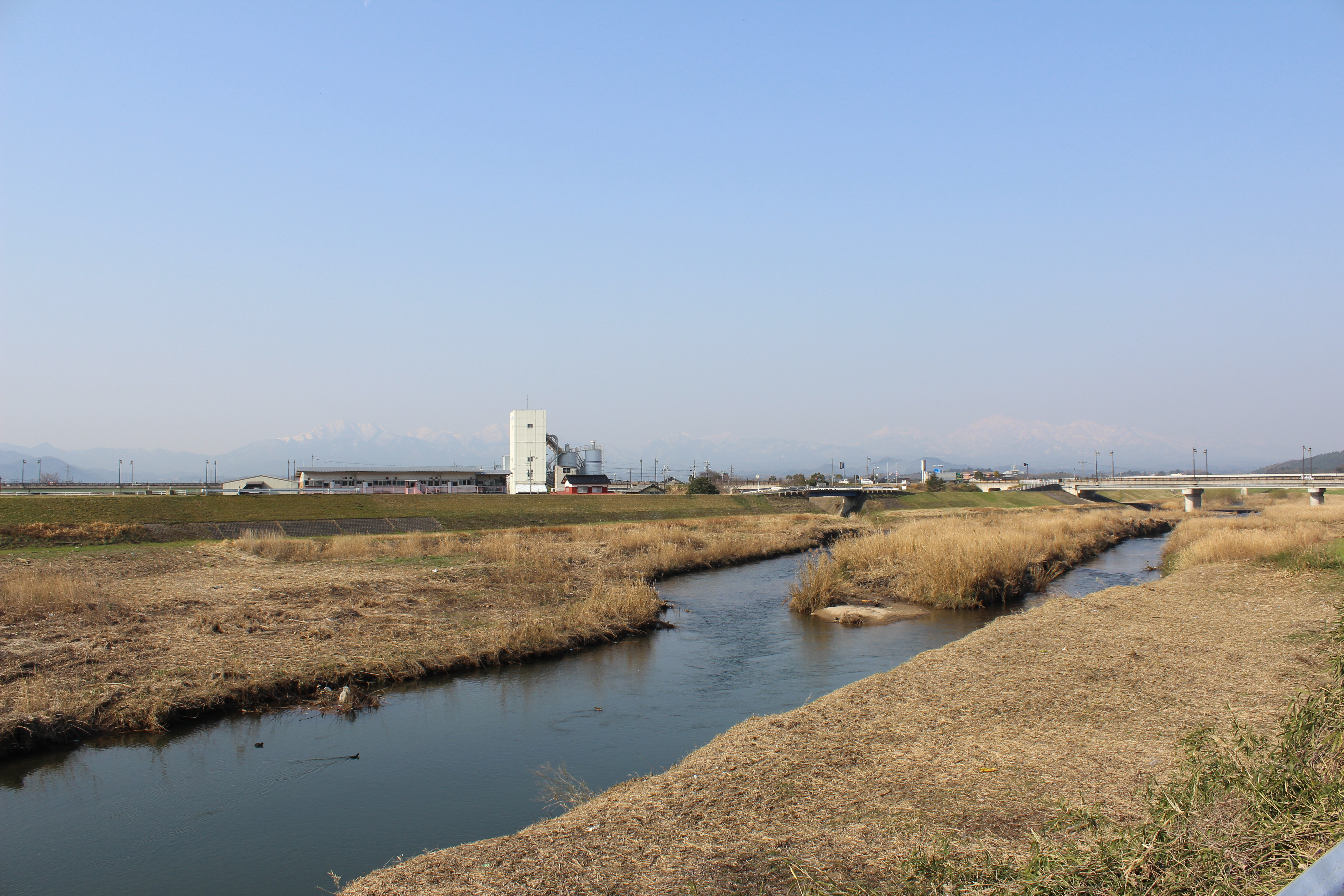 鳥取県倉吉市和田東町付近。上流方向の和田橋を望む。